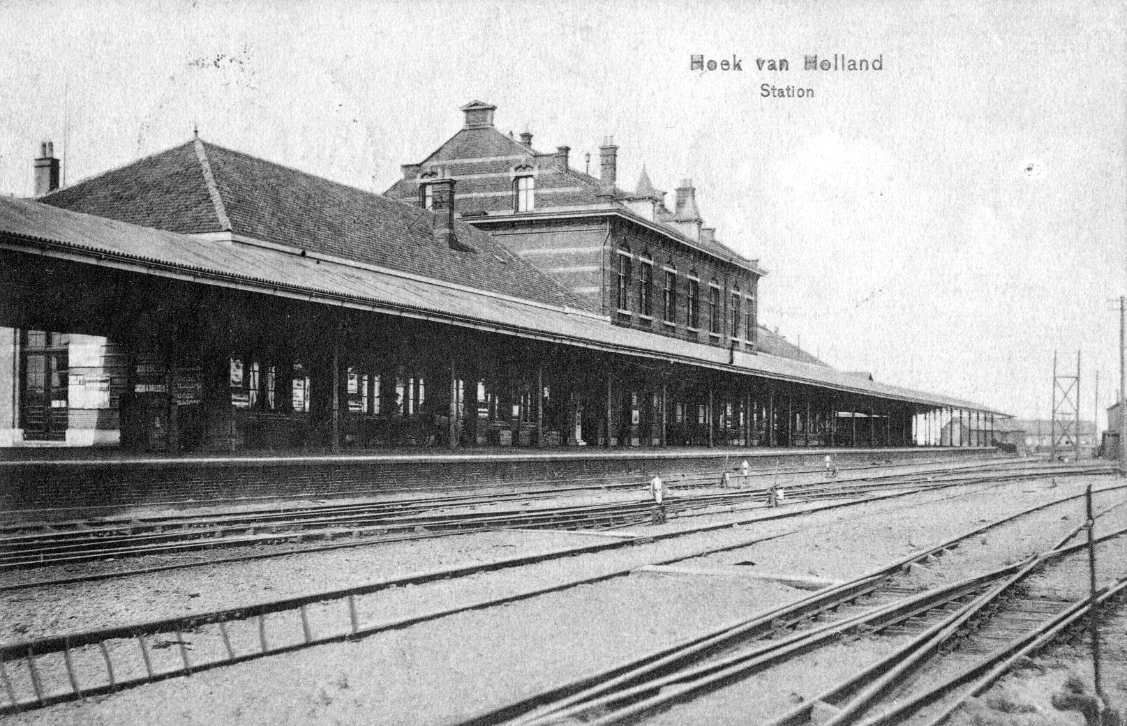 Station Hoek van Holland Haven; circa 1907. Collectie van het Utrechts Archief.